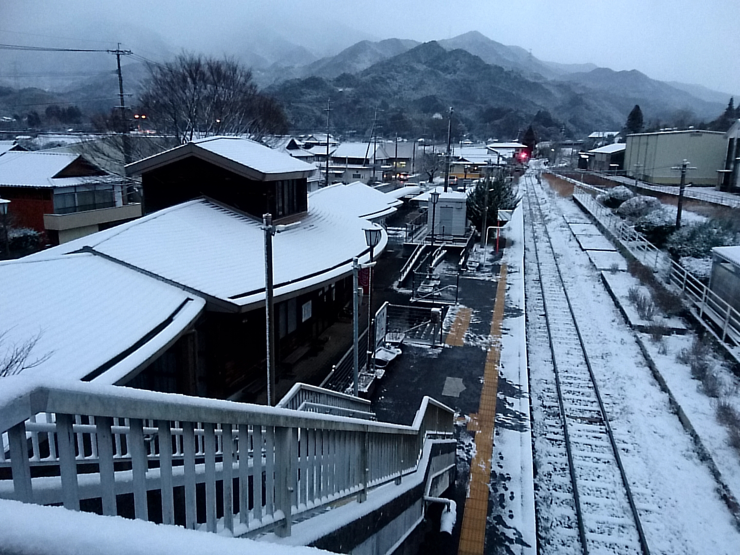 相知駅のホーム